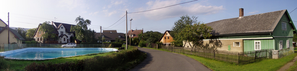 Paceřice - panoramatický pohled z centra obce.